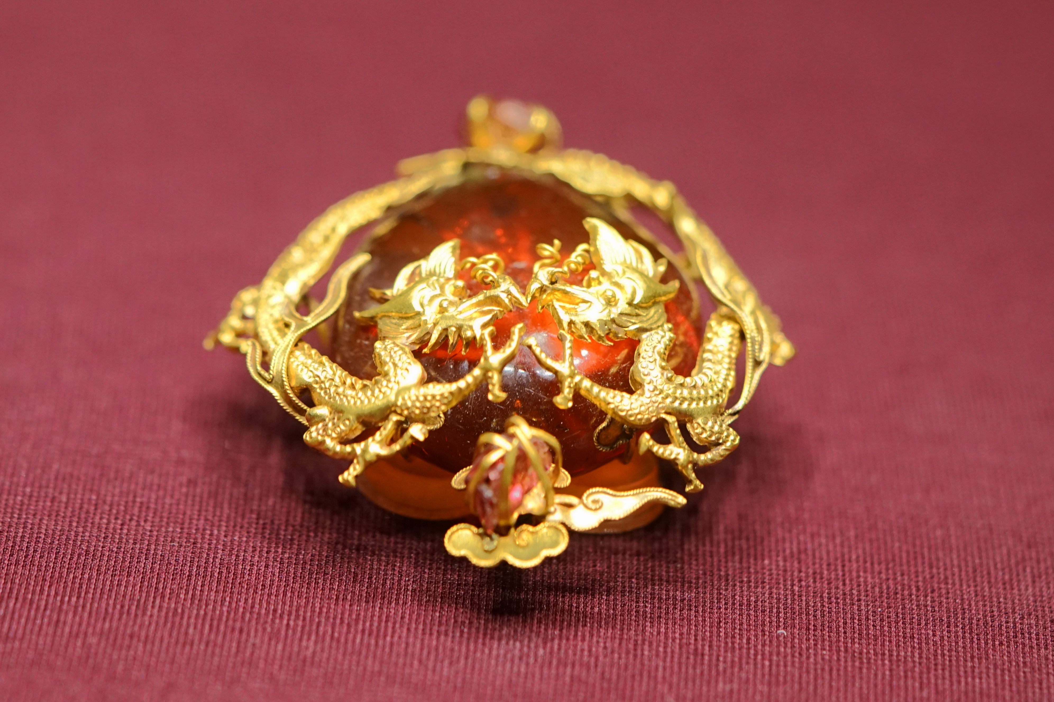 中文（中国大陆）: 镶金托双龙戏珠纹琥珀饰件 明 南京邓府山佟卜年夫人陈氏墓出土 中央红色琥珀，两旁有左右对称的金龙，背面中心有如意云状金片，从旁伸出八根金丝夹住琥珀。使用时用小钗固定于发髻上。